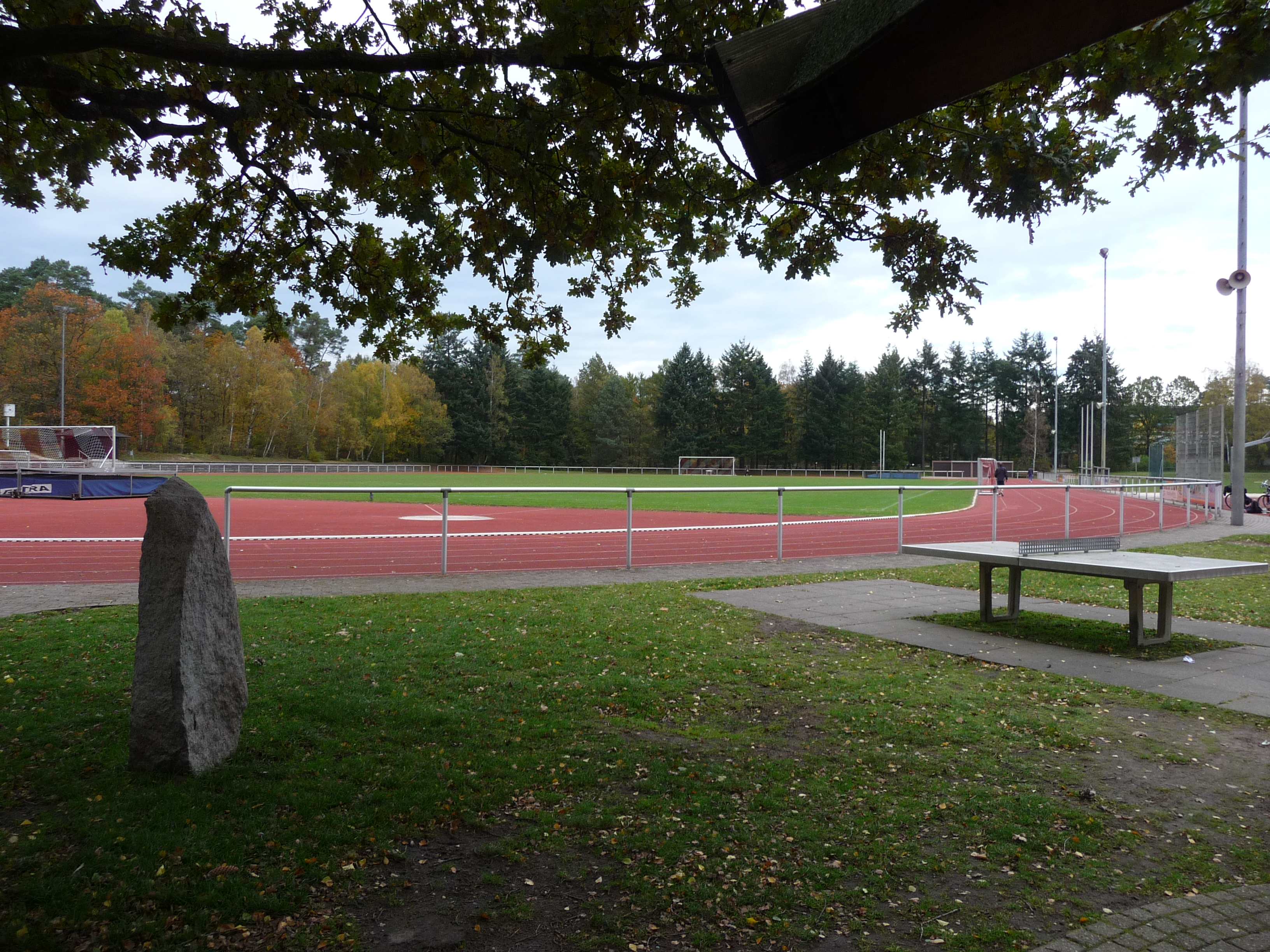 Hindenburgstadion in Soltau